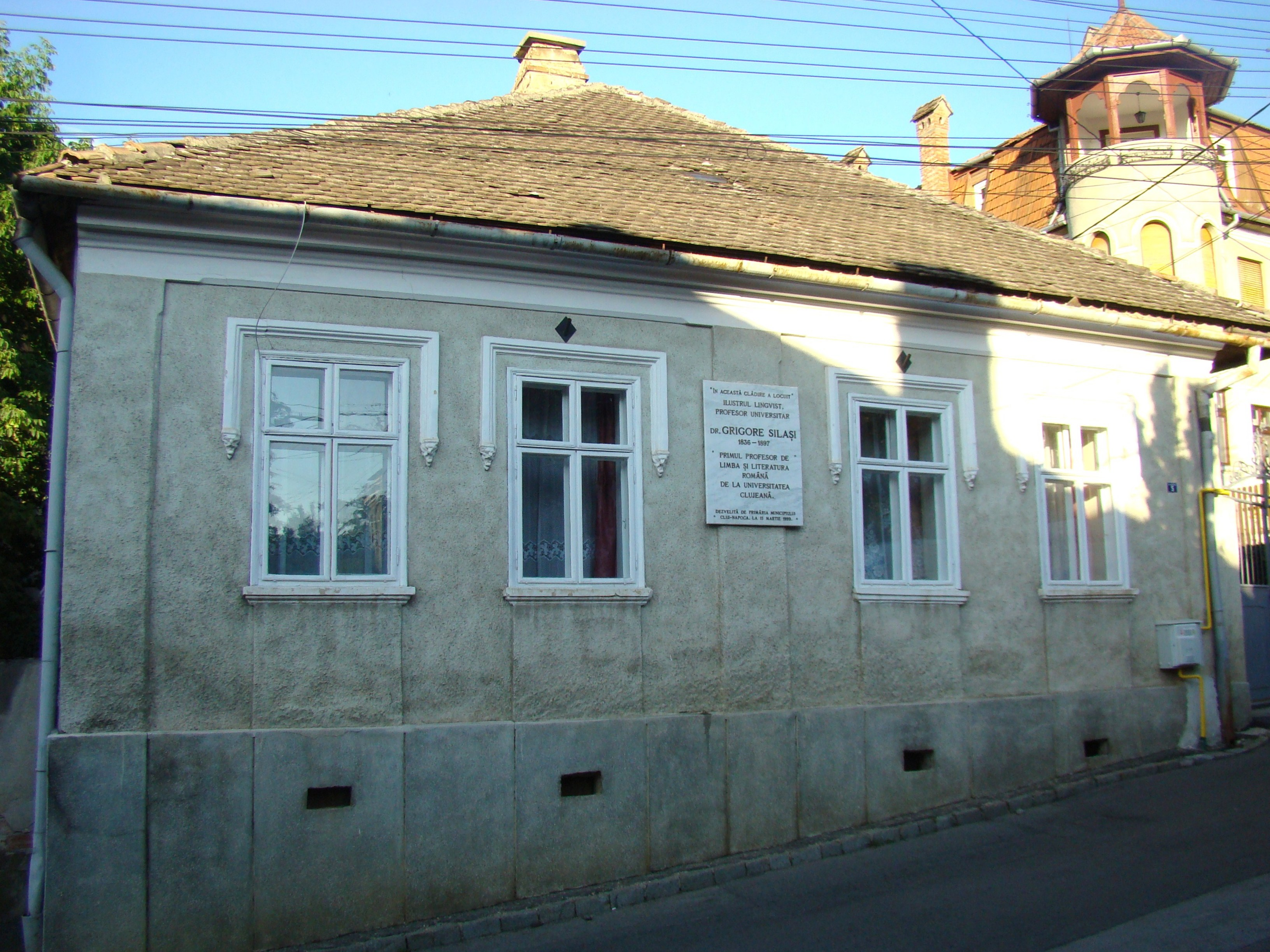 Casa în care a locuit dr. Silași Grigore (str.Bisericii Ortodoxe, nr.5)